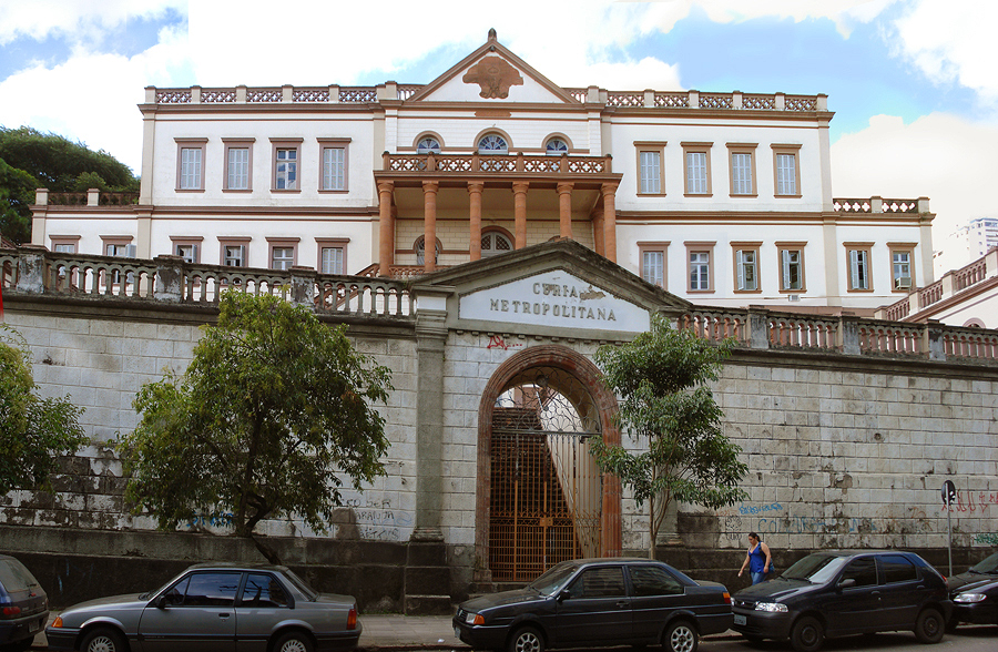 Prédio histórico da Cúria Metropolitana de Porto Alegre, Brasil.